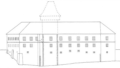 Idealna zasnova